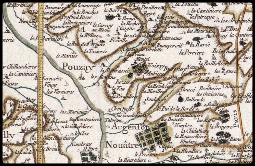 Pouzay dans la seconde moitié du XVIIIe siècle